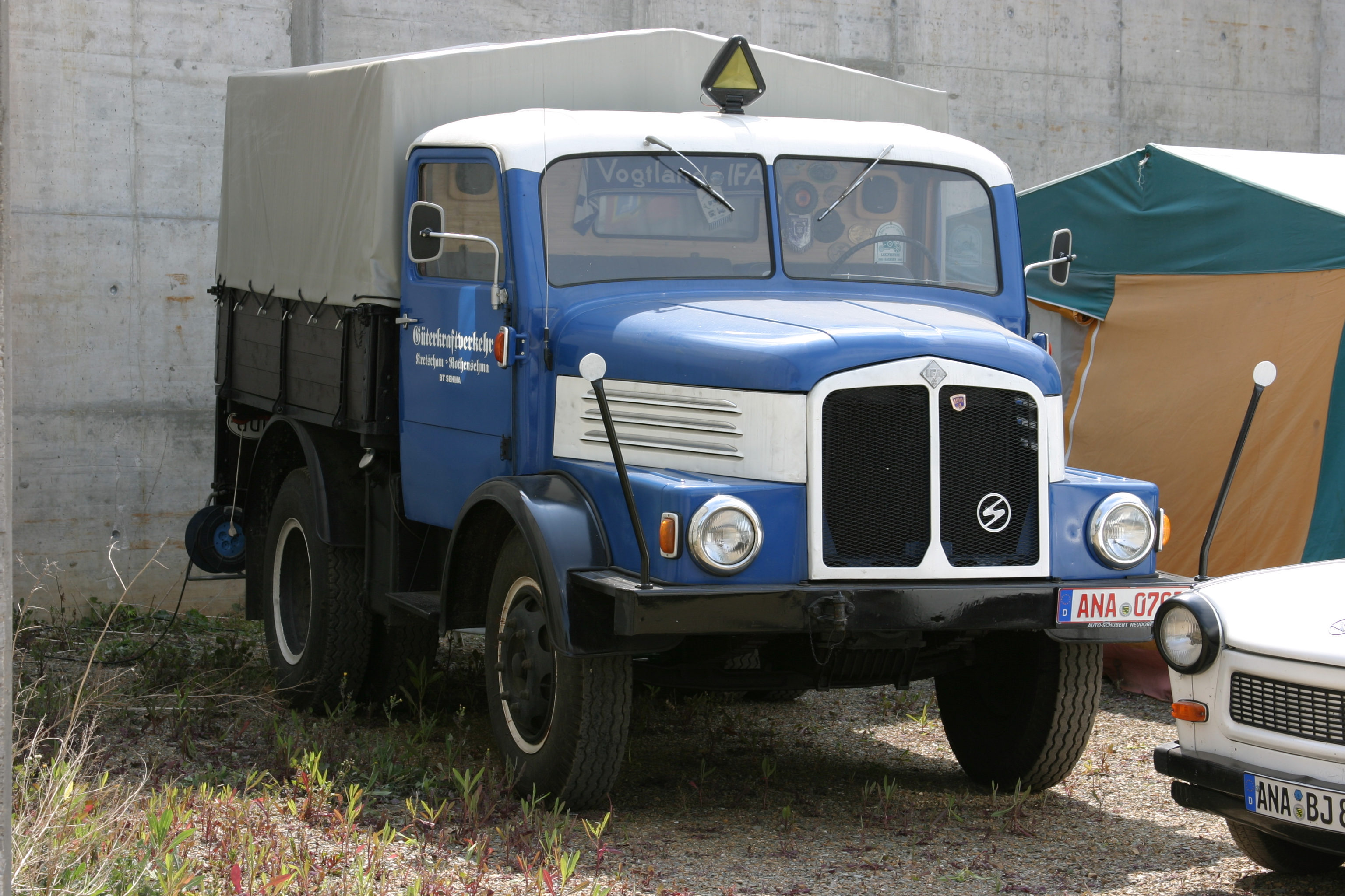 Auf dem H3A basierende Zugmaschine Horch Z3, hier noch mit Horch- und Sachsenring-Emblemen